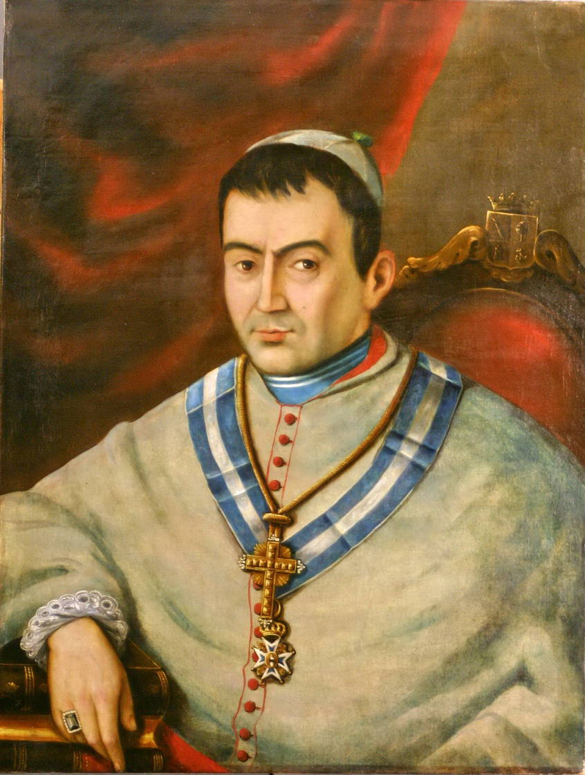 Retrato del eclesiástico español Miguel García Cuesta (1803-1873), que llegó a ser cardenal de la Iglesia Católica y también rector del Seminario Conciliar de Salamanca, obispo de Jaca, arzobispo de Santiago de Compostela y senador vitalicio.